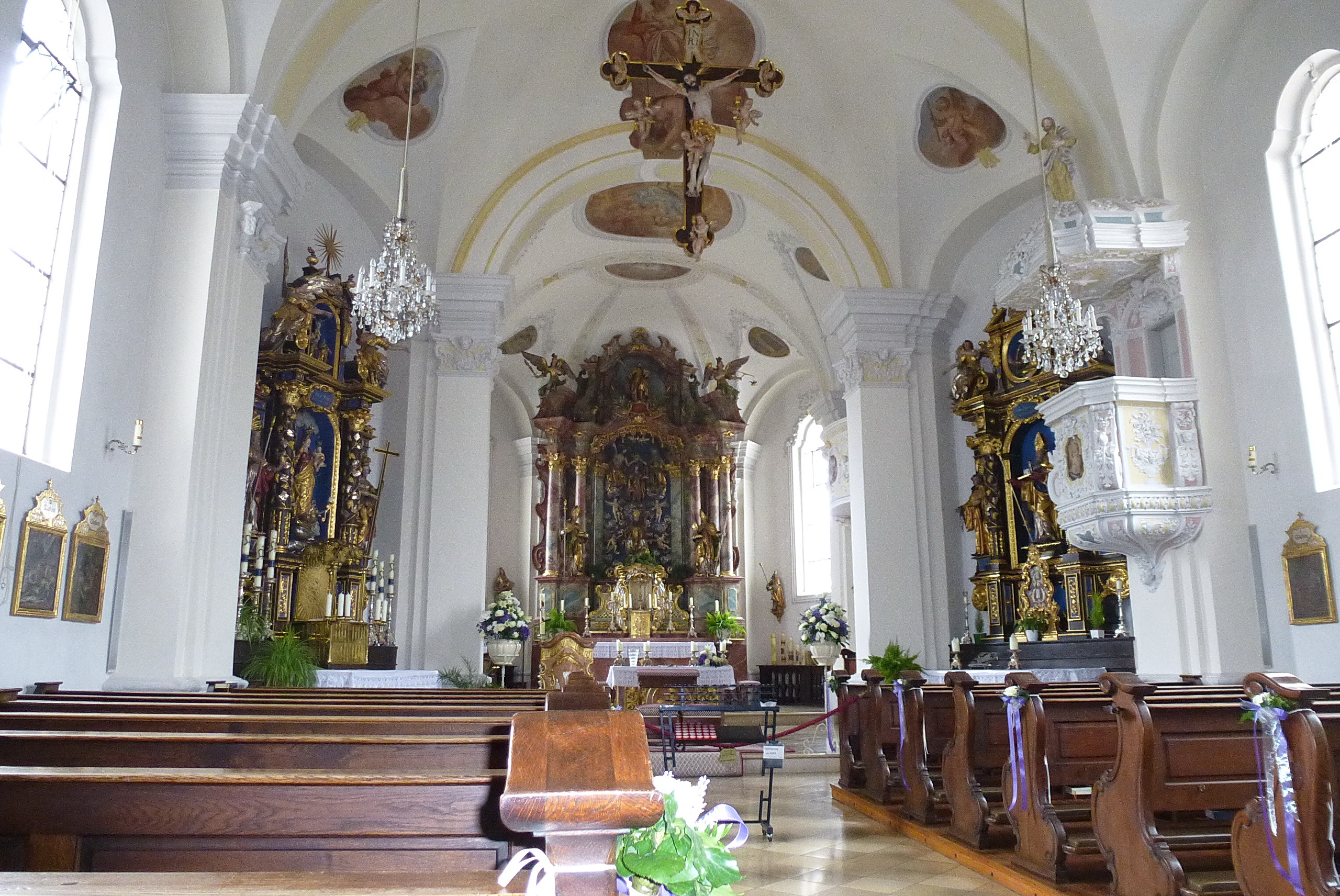 Katholische Kirche St. Valentin in Unterföhring